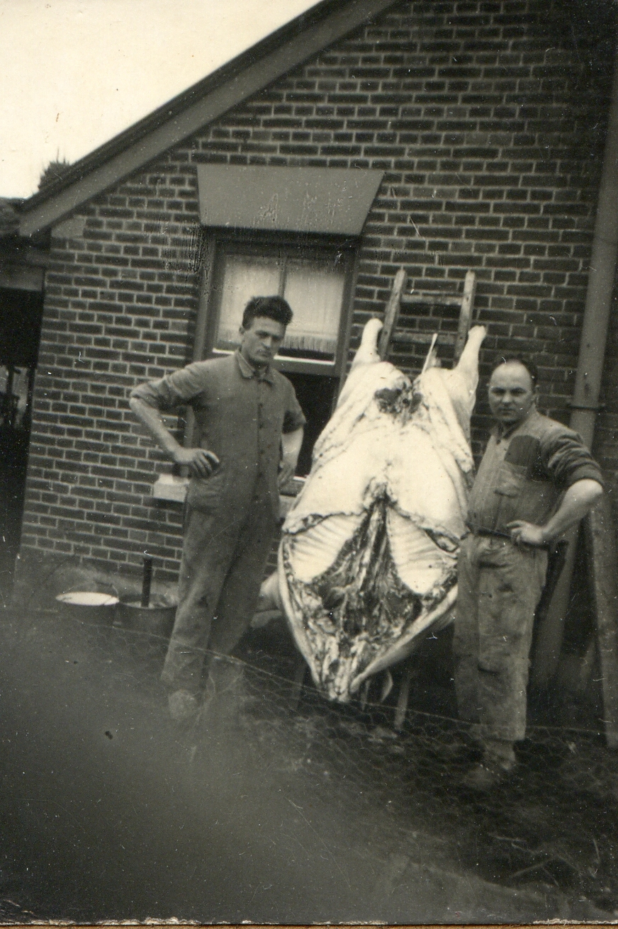 Slager Joosten (links) uit Zeilberg bij een geslacht varken aan de ladder. Foto Jas Berkers, beschikbaar gesteld door Jan Joosten.